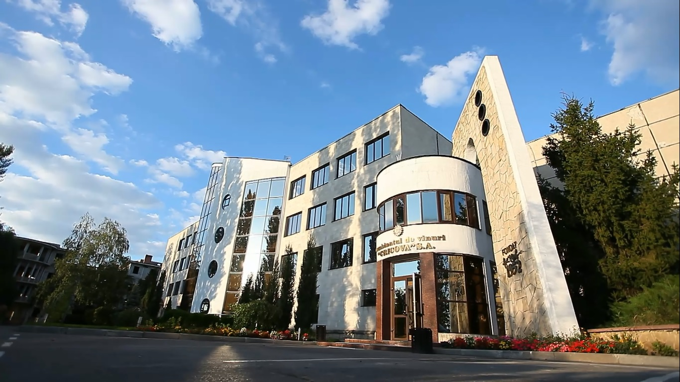 Blocul administrativ